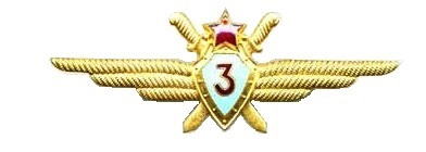 Нагрудный знак классной квалификации "Военный лётчик 3-го класса" образца 1950 года